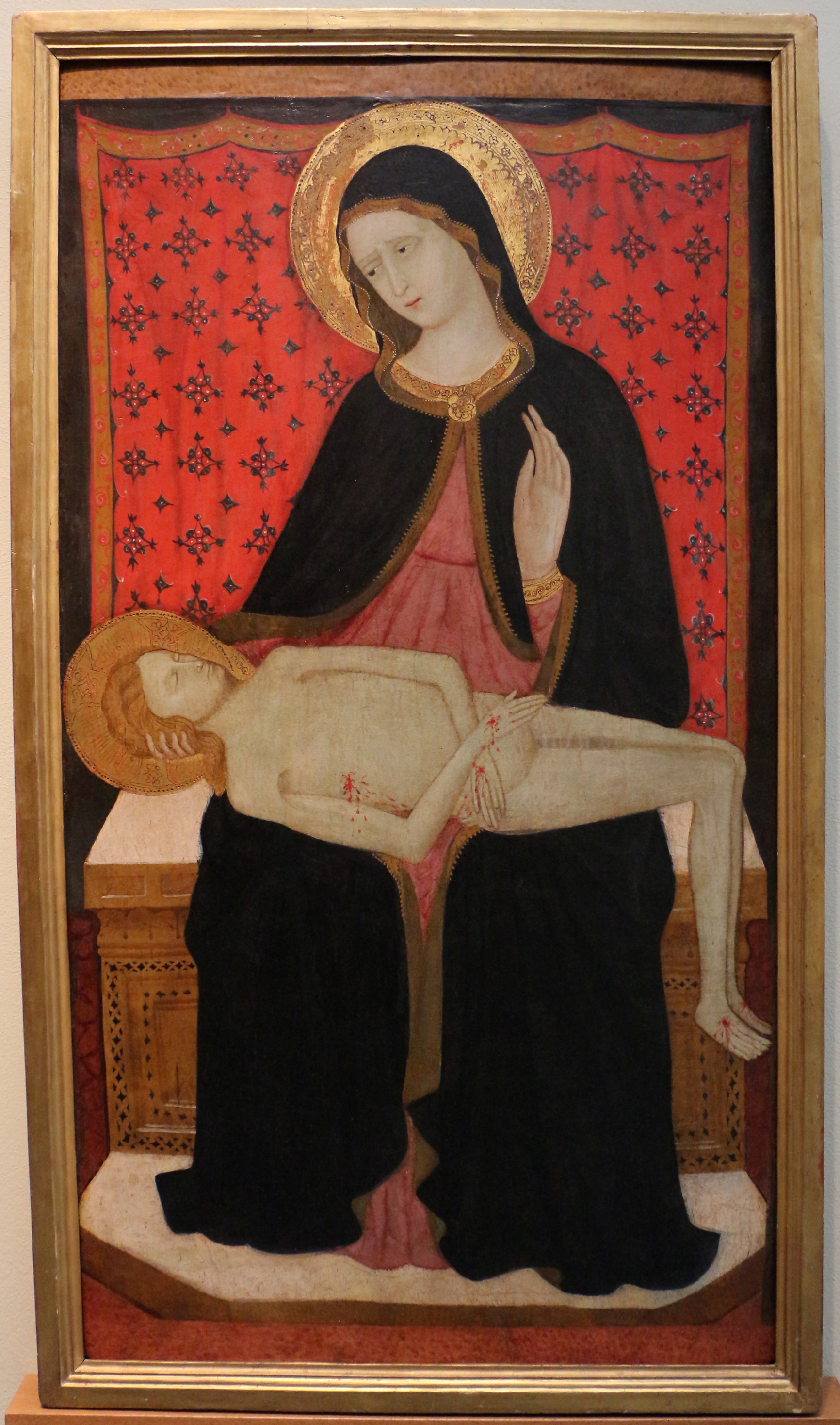 Pinacoteca Nazionale di Bologna This is a photo of a monument which is part of cultural heritage of Italy.